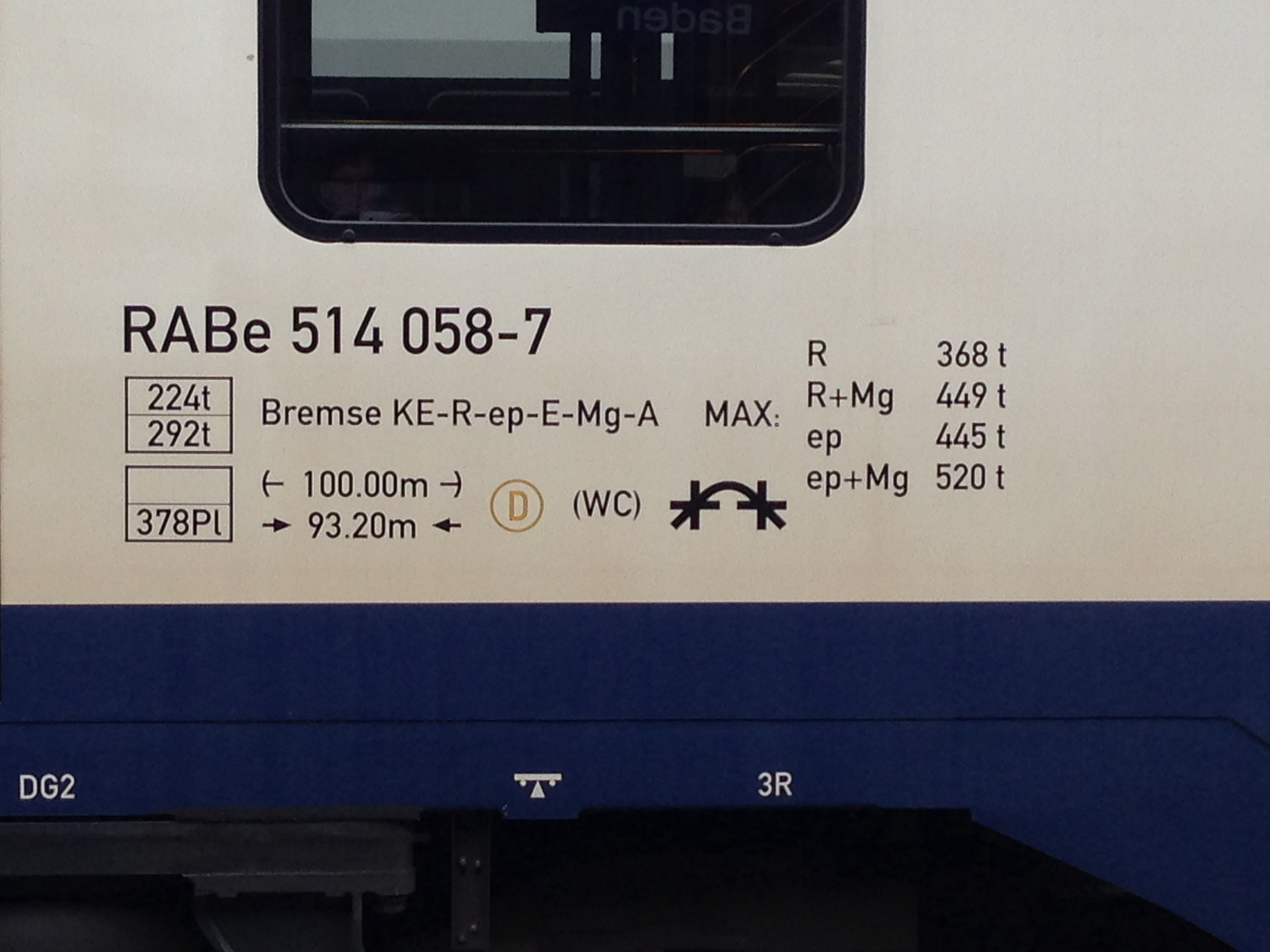 Anschrift am Doppelstocktriebzug (DTZ) 514 058 der SBB